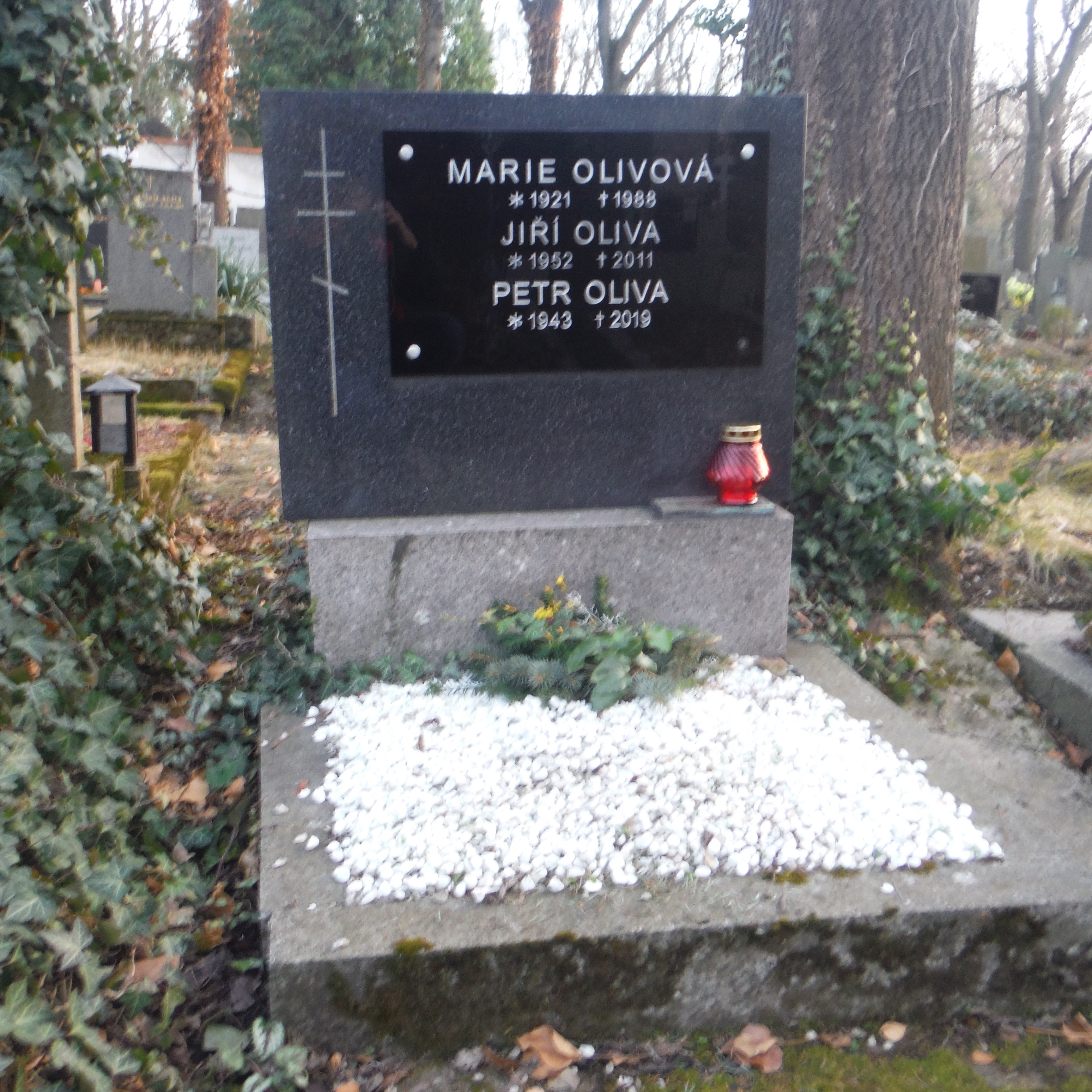 hrob